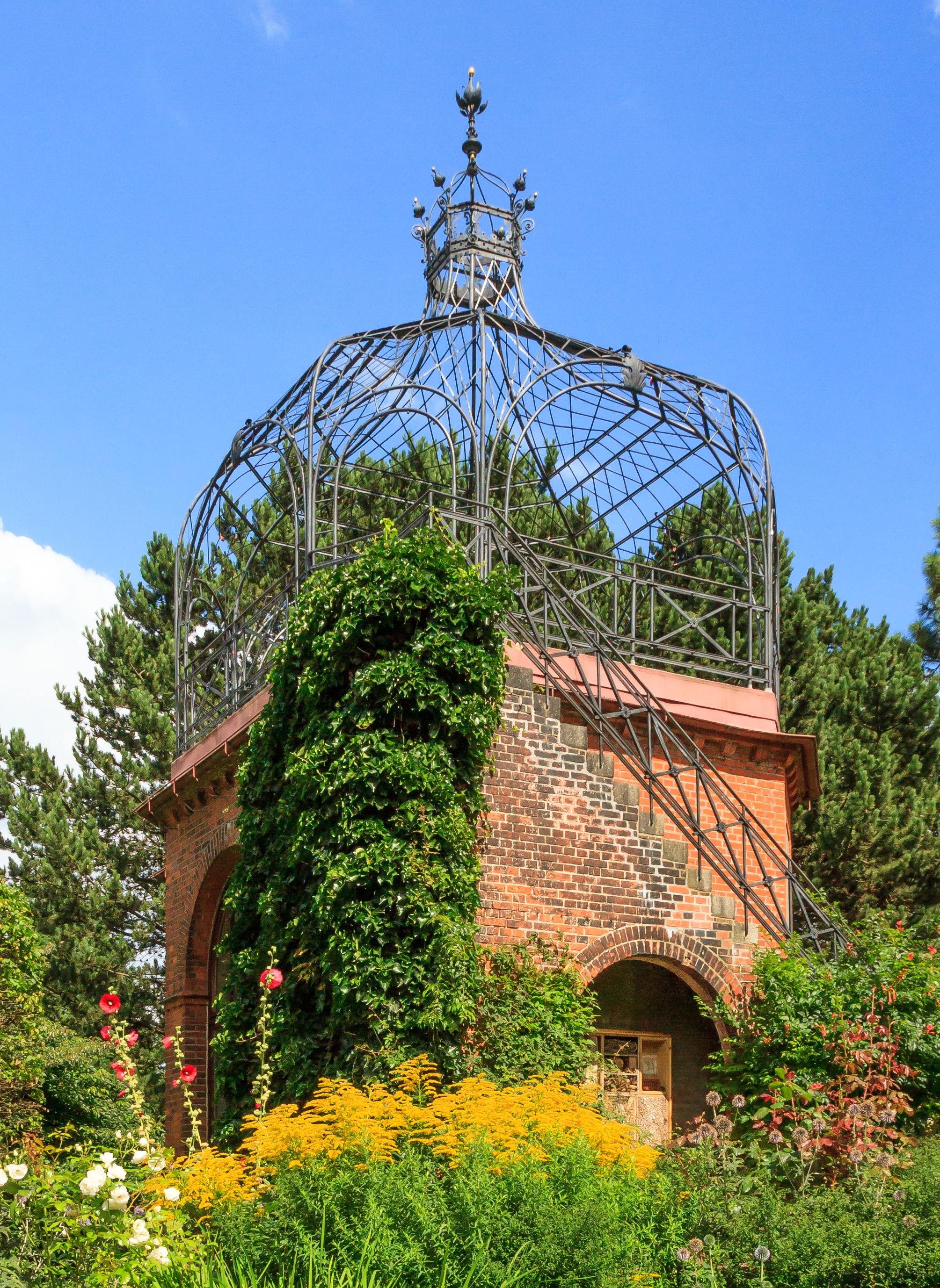 Pavillon (Alter Botanischer Garten, Kiel)